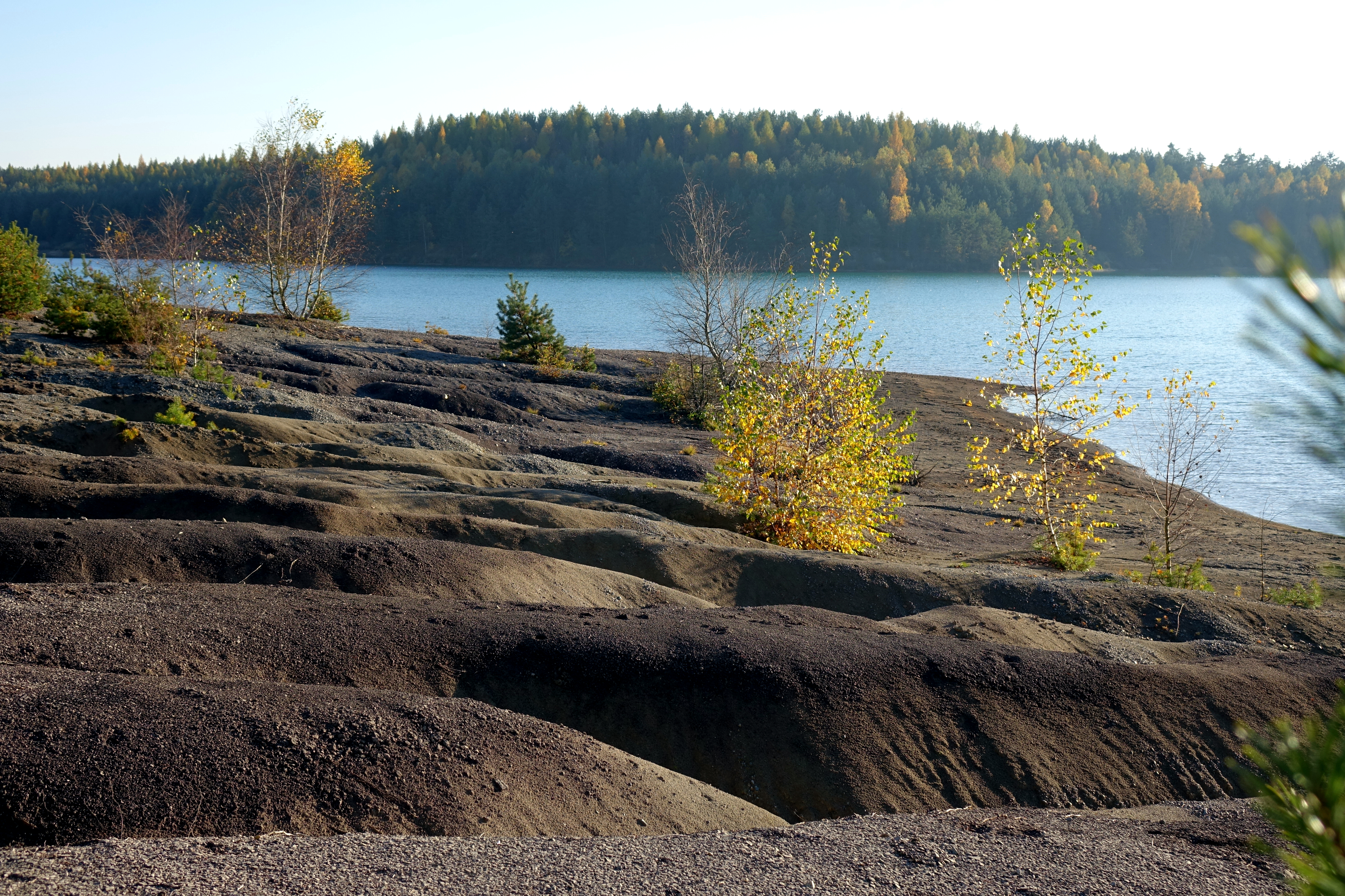 Der Lindensee ist Teil des Rauberweihergebietes bei Wackersdorf. Früher Braunkohleabbau, heute geschützte Natur. Übersicht-Nr.376G001